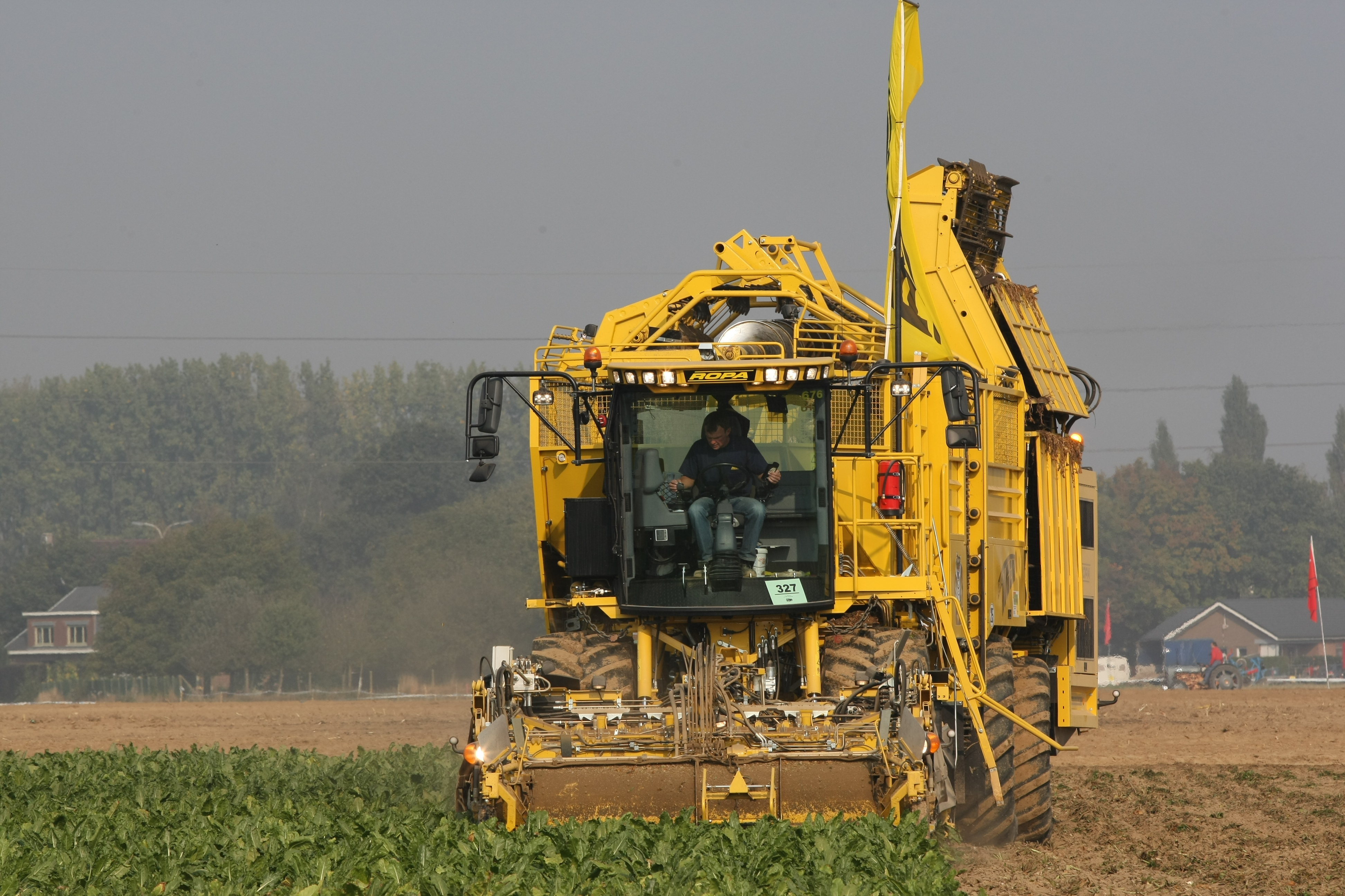 Ein Rübenvollernter des Herstellers ROPA.